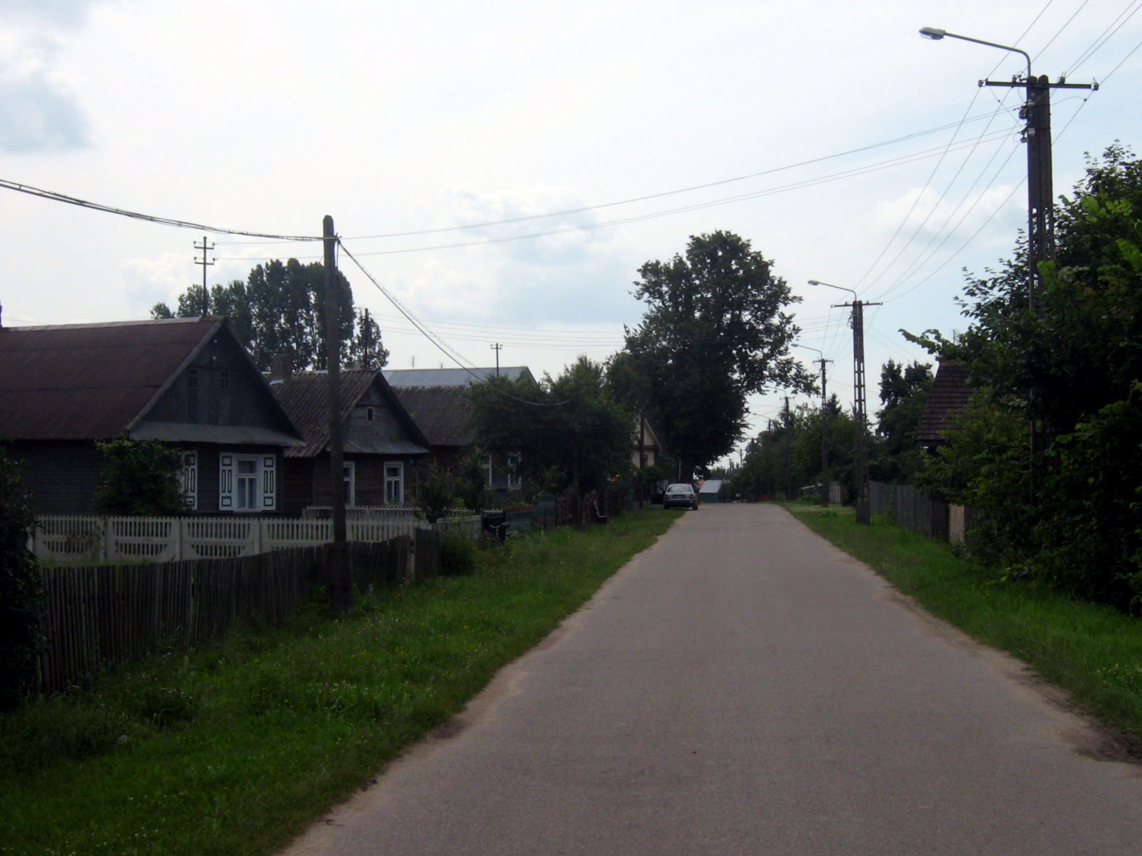 Droga w Chytrze